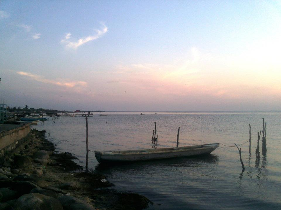 Un cayuco típico de Paredón (Chiapas)